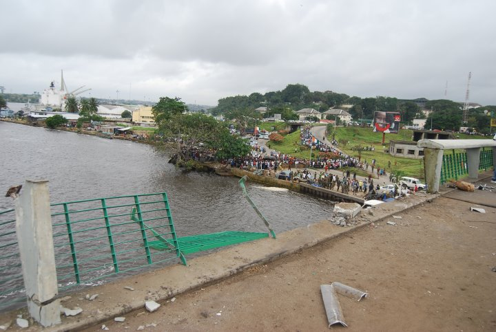 Tragédie sur le Pont Félix Houphouet Boigny